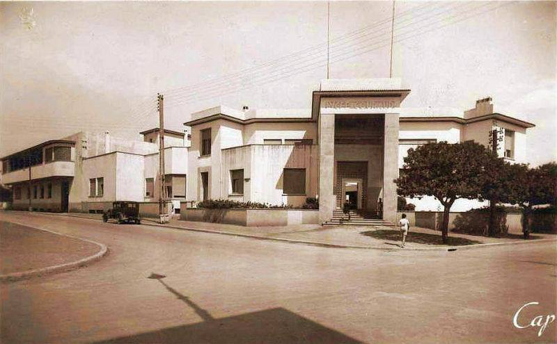 Une image du lycée Hassan II en 1940, il était appelé lycée Gouraud à l'époque.